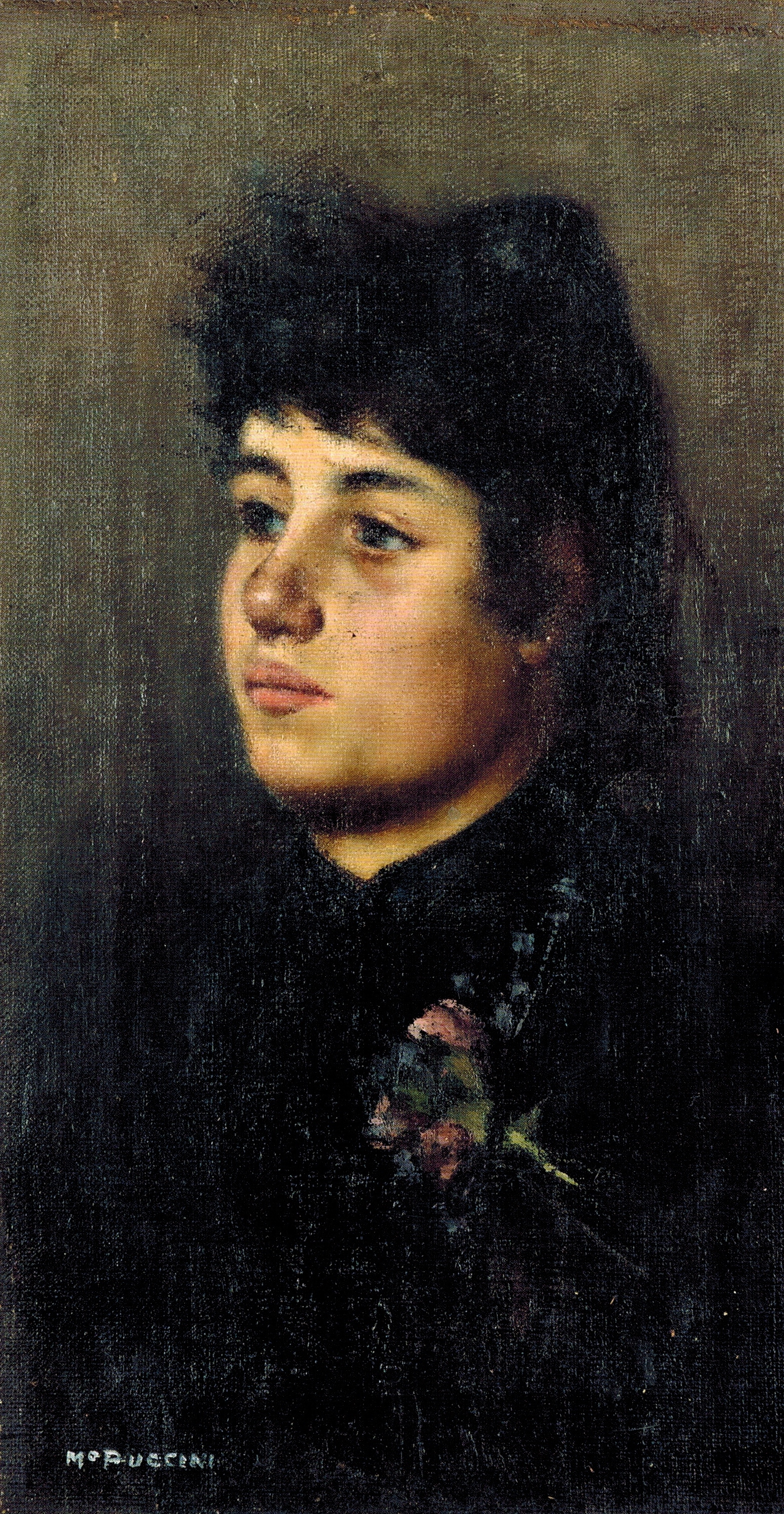 Ölgemälde "Portrait einer jungen Frau", signiert 1890